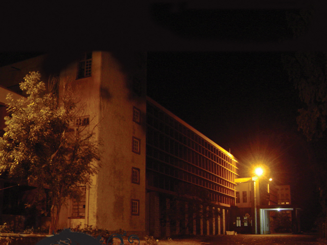 തൃശ്ശൂർ എഞ്ചിനീയറിംഗ് കോളേജിന്റെ ഒരു രാത്രി ദൃശ്യം. [graphics added later- at bottom]